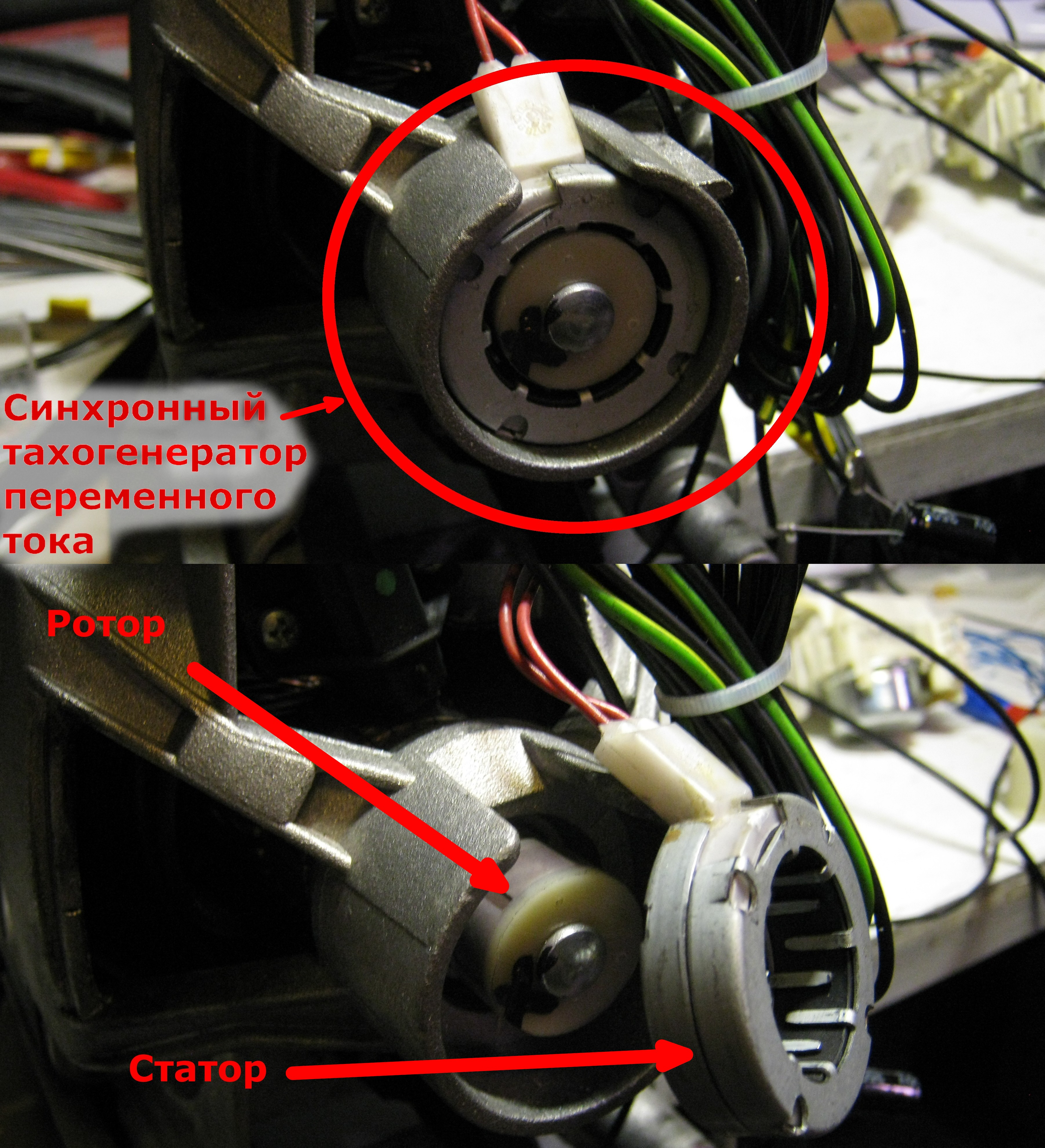 16-ти полюсный синхронный тахогенератор переменного тока встроенный в коллекторный двигатель от стиральной машинки.